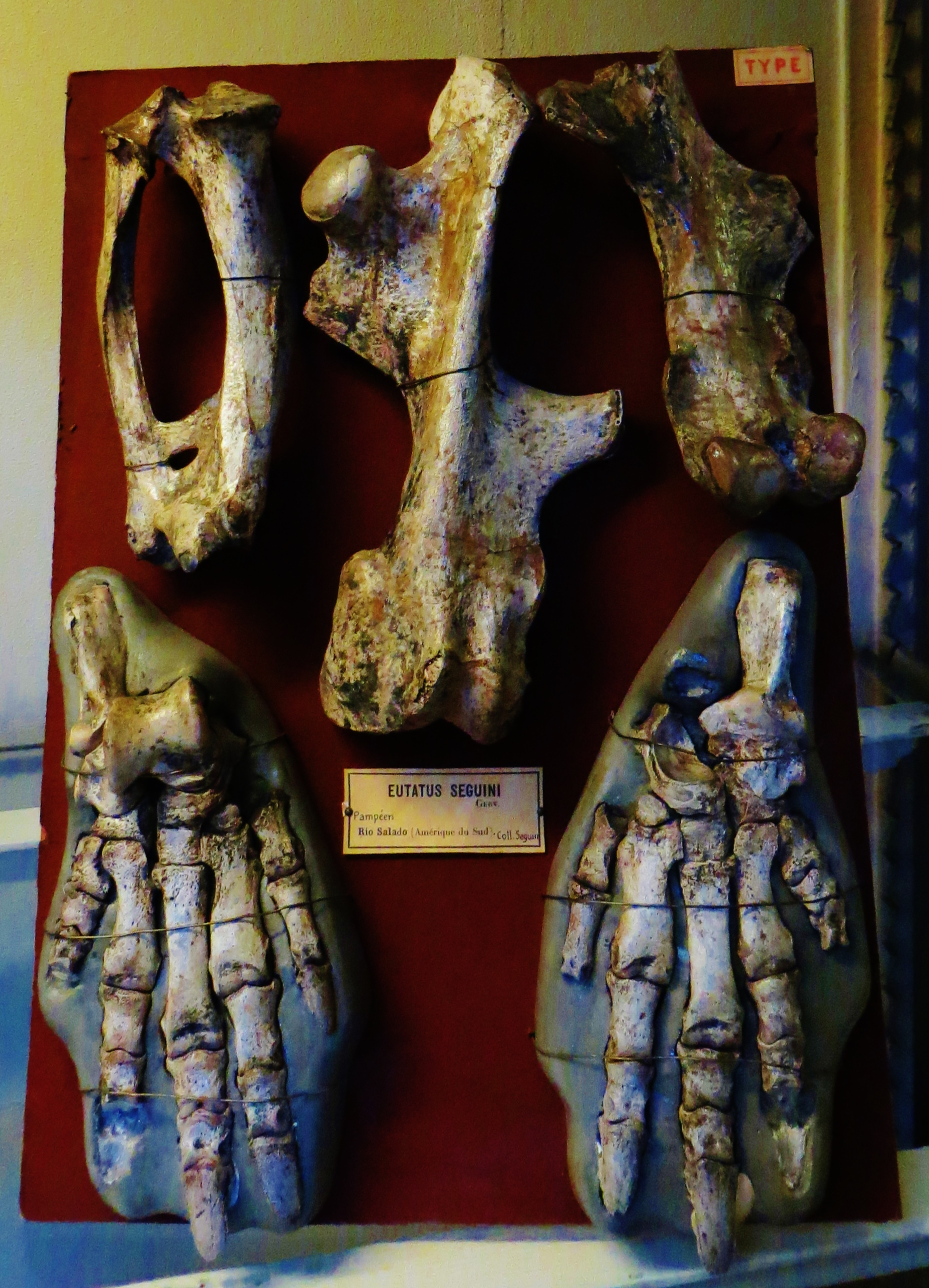 Fossil of Eutatus, an extinct mammal- Took the photo at Musee d'Histoire Naturelle, Paris